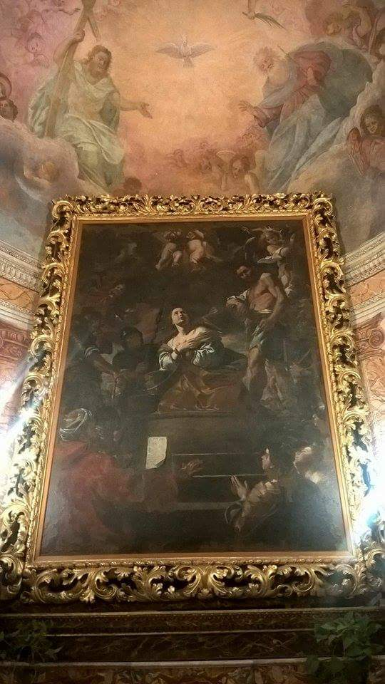 Il martirio di santa Caterina, cappella omonima